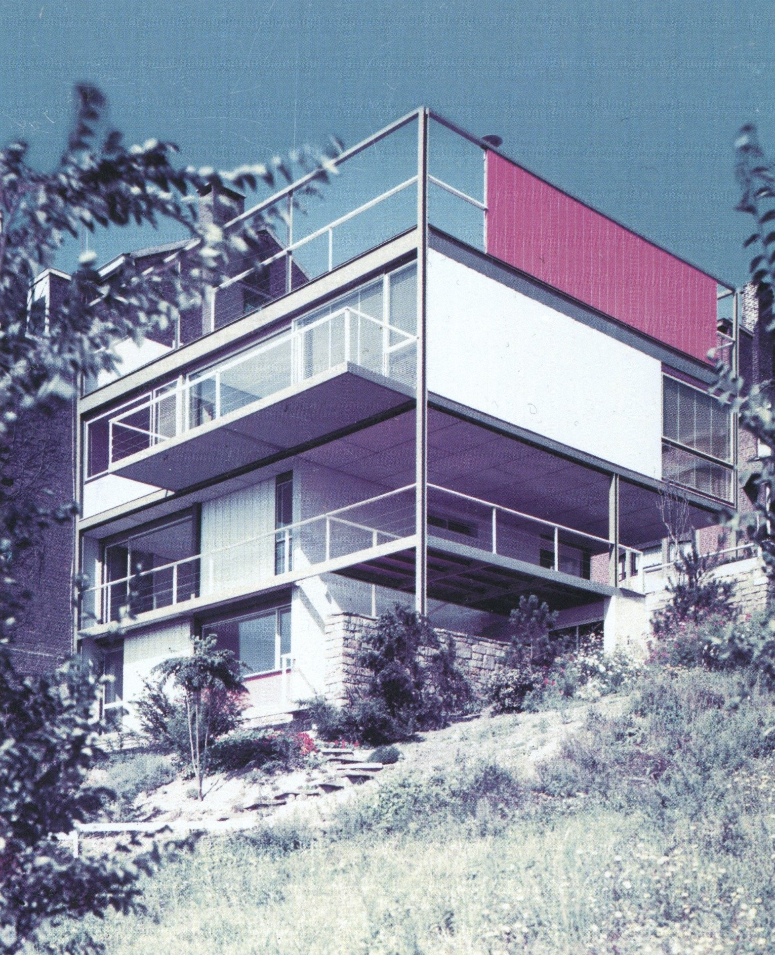 Maison Mozin vue depuis le jardin en pente